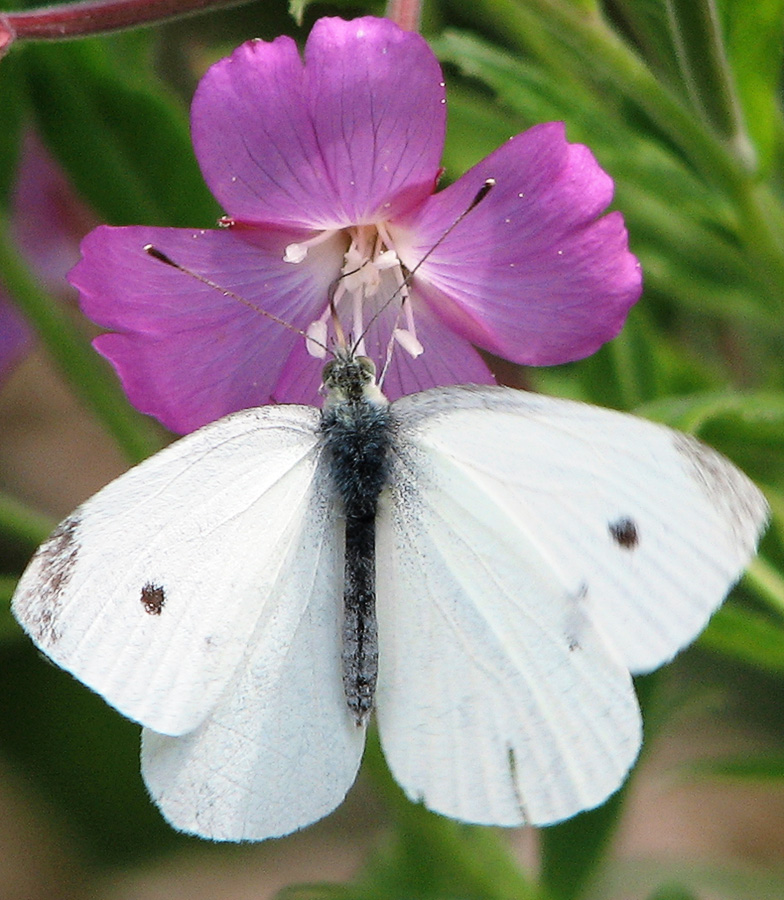 Beschreibung: Kleiner Kohlweißling / Small white (Pieris rapae) Fotograf: Darkone, 14. August 2005